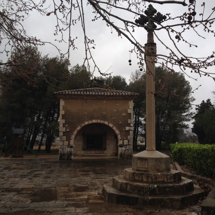 Ermita del Lorito d'Ulldecona.